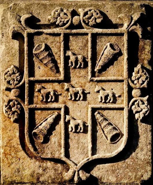 Algunos tratadistas manifiestan que la casa de Butrón trajo por armas, en un principio, los lobos de Vizcaya, hasta que uno de sus Señores, por haberse hallado en la batalla de las Navas de Tolosa, y en recuerdo de ella, las modifico, organizándolas de la siguiente manera: De gules, con una cruz de plata, cargada de cinco lobos pasantes, de sable, y cantonada de cuatro buitrones de oro. Armas de Butrón. Pero, independientemente de lo que afirman los tratadistas, lo cierto es que este escudo lo ostentaron desde tiempos muy antiguos los Butrón, en Santa María de Gatika, Bilbao y Merindad de Uribe. Los Butrón Muxika (Múgica) utilizaron: Partido : lº las armas anteriormente descritas por Butrón, y 2º, de gules, con una banda de oro, engolada en cabezas de dragones de sinople, y acompañada de dos escudetes de plata, cargado cada uno de ellos de tres fajas de azur, por el apellido Muxika (Múgica).